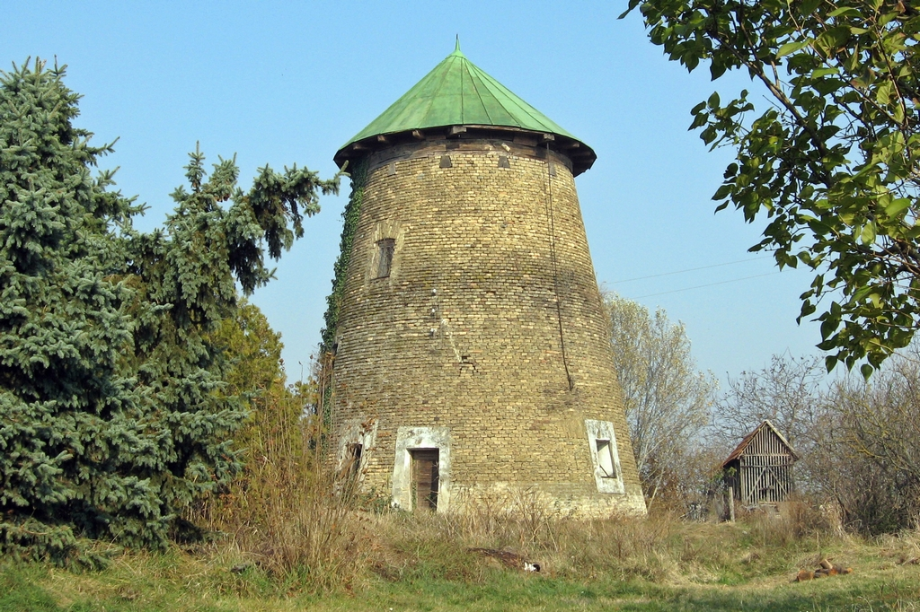 Jó állapotú szélmalom, vitorla nélkül